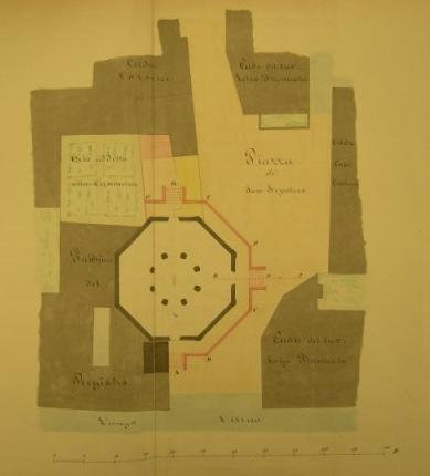 Pianta della chiesa del Santo sepolcro di Pisa e degli spazi circostanti in un progetto di resturo